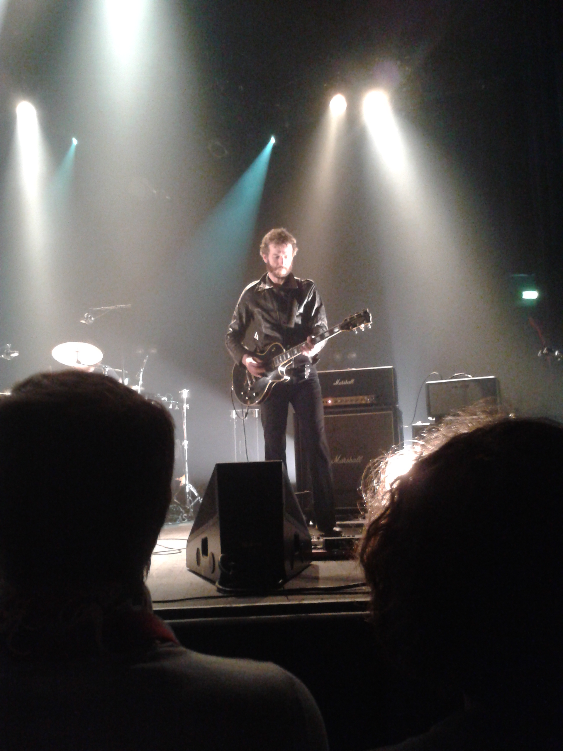 Sébastien Hoog en concert d'Izia au Stéréolux à Nantes le 26 avril 2012